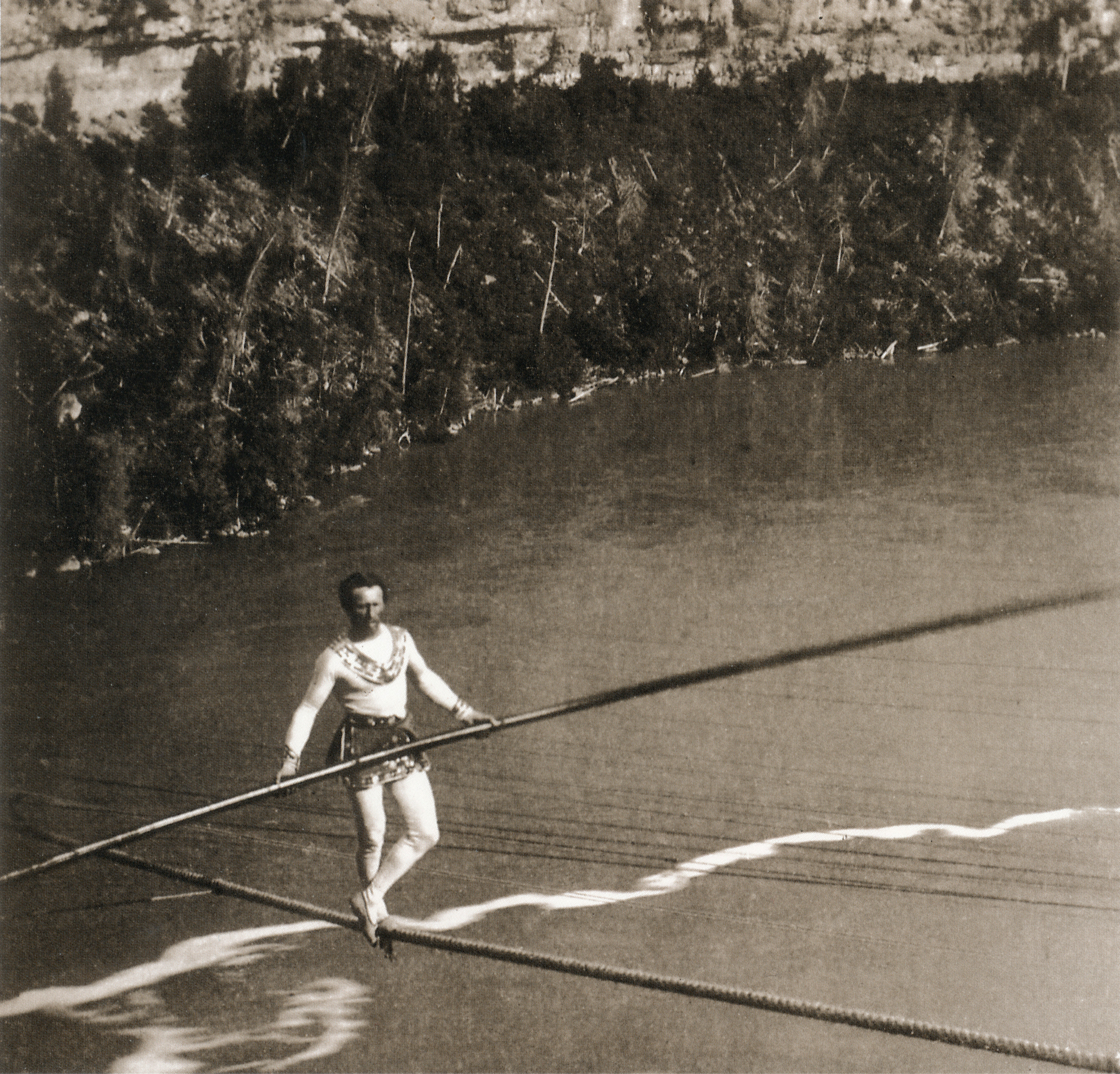 Charles Blondin überquert den Niagara River als Erster auf dem Hochseil. Sommer 1859